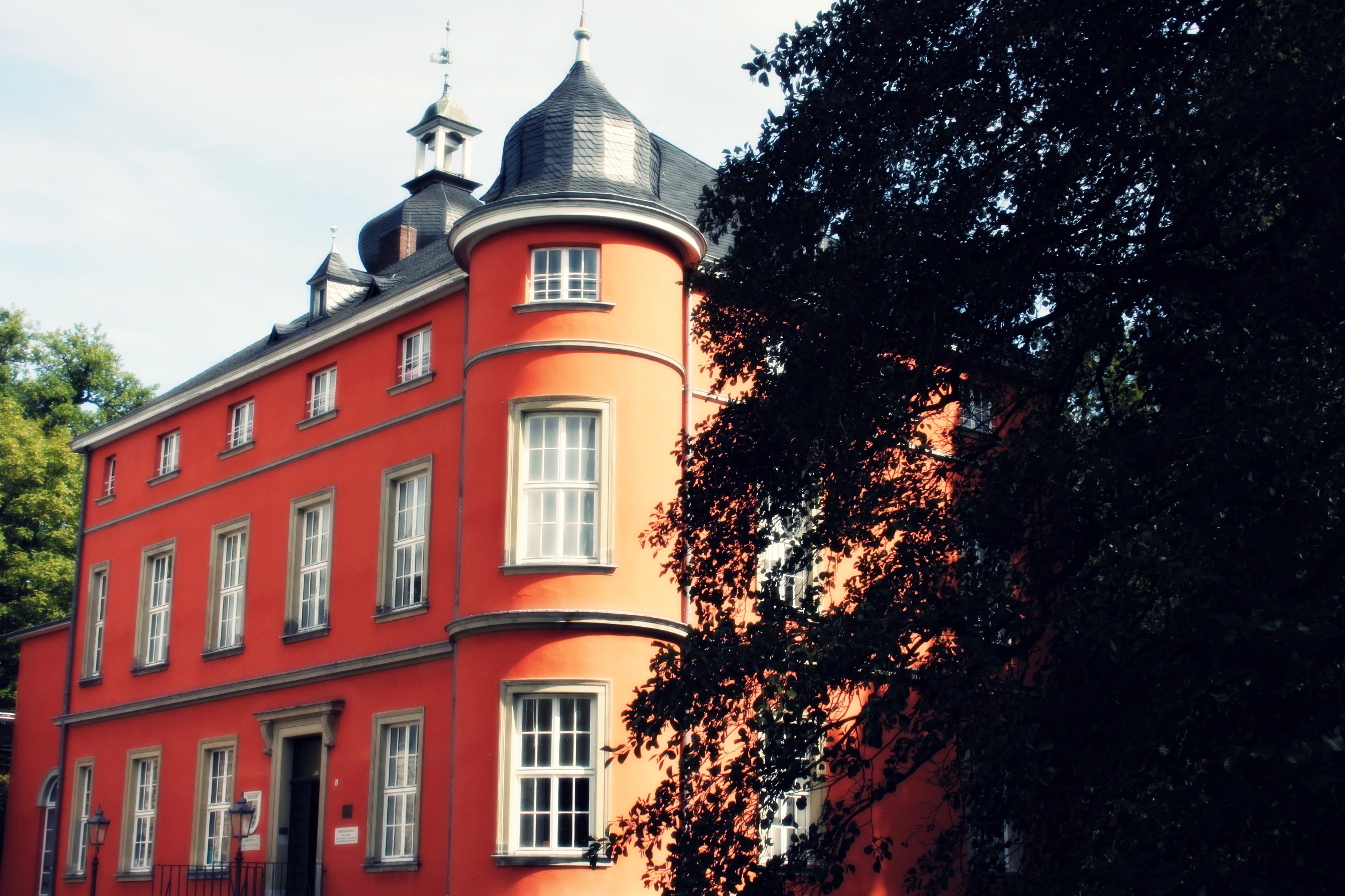 Die Burg Wissem ist ein altes Herrenhaus. Es ist das einzige Museum für Bilderbuchkunst und Jugendbuchillustration in Europa.